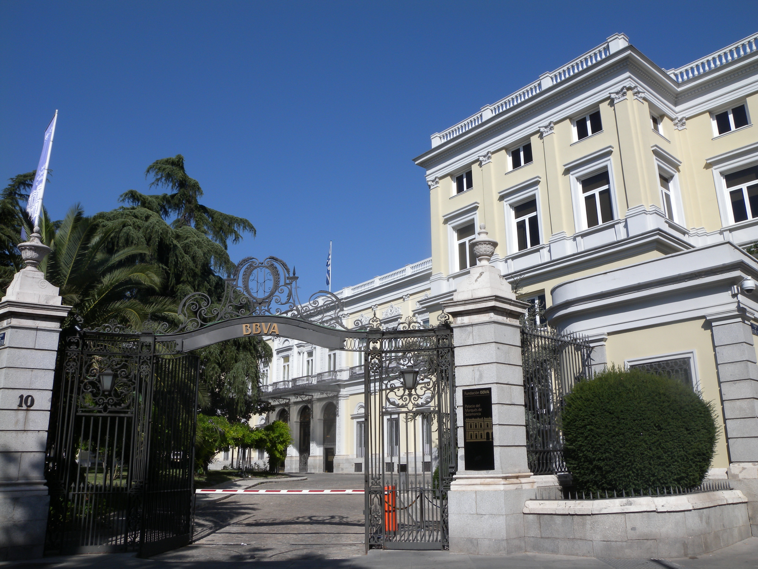 Palacio del Marqués de Salamanca, actualmente sede de la Fundación BBVA.